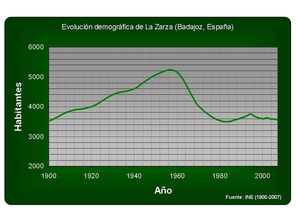 Evolución demográfica de La Zarza (Badajoz, España)